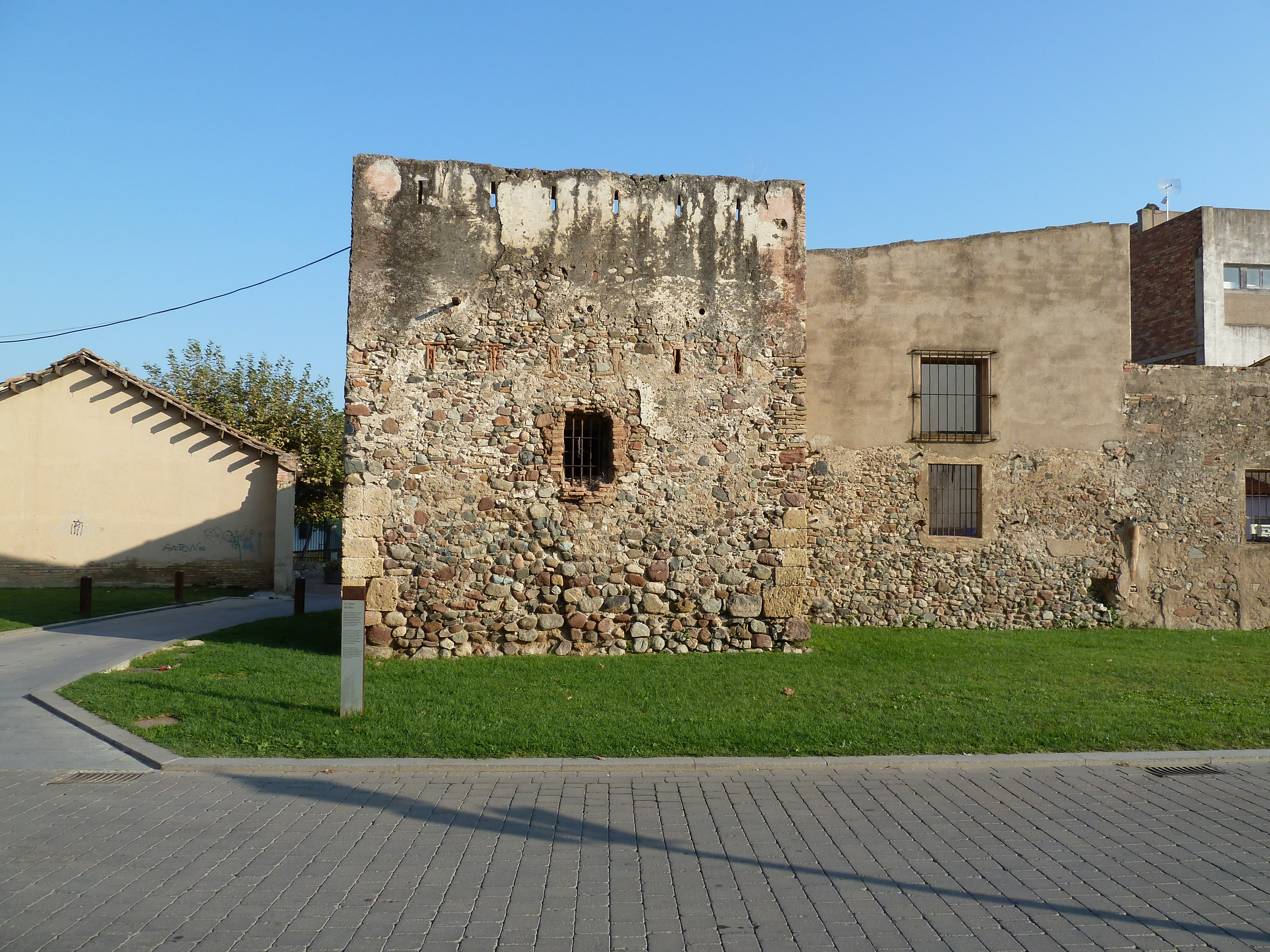 Muralla de Cambrils